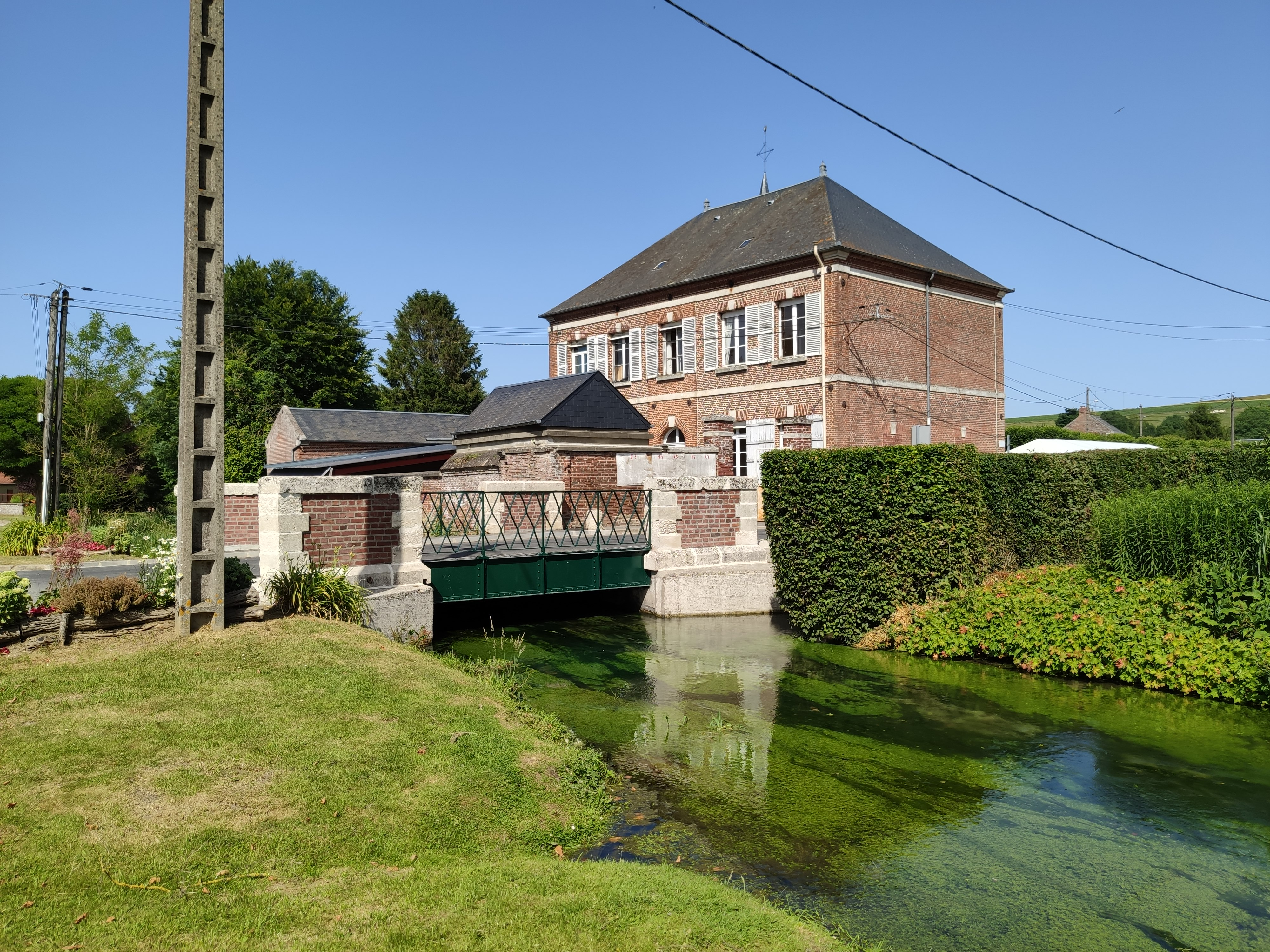 Fontaine-Bonneleau : Le pont sur la Celle et le bâtiment de la mairie-école (côté école)